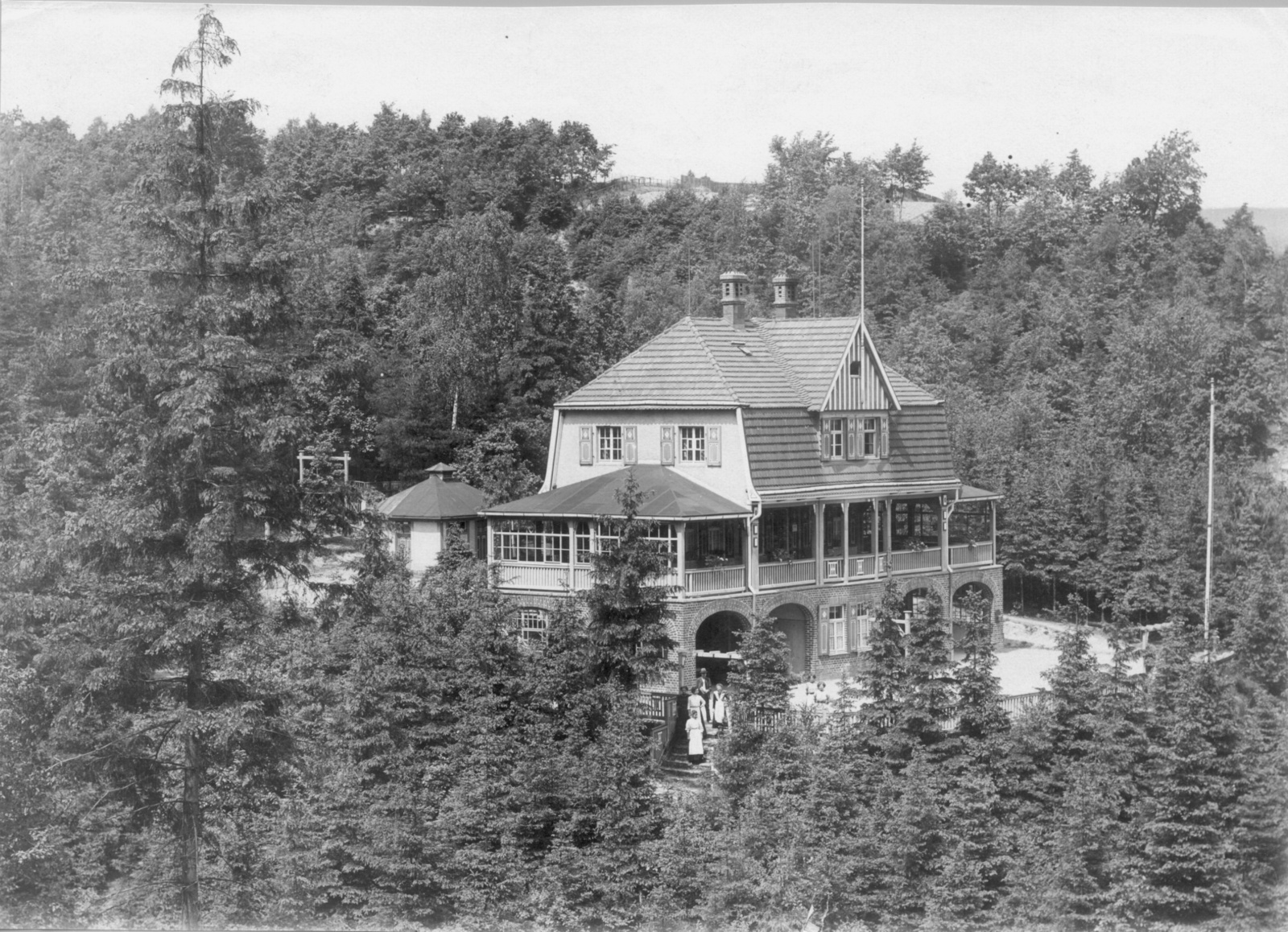 Deuben (Freital-Deuben). Walderholungsstätte im Wettingrund. Eingangsseite mit posierenden Angestellten